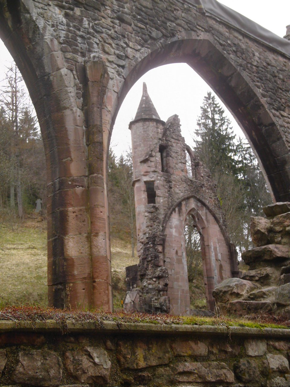 Klosterruine Allerheiligen (Schwarzwald): Blick durch die Arkaden auf den Turm am nördlichen Querhaus